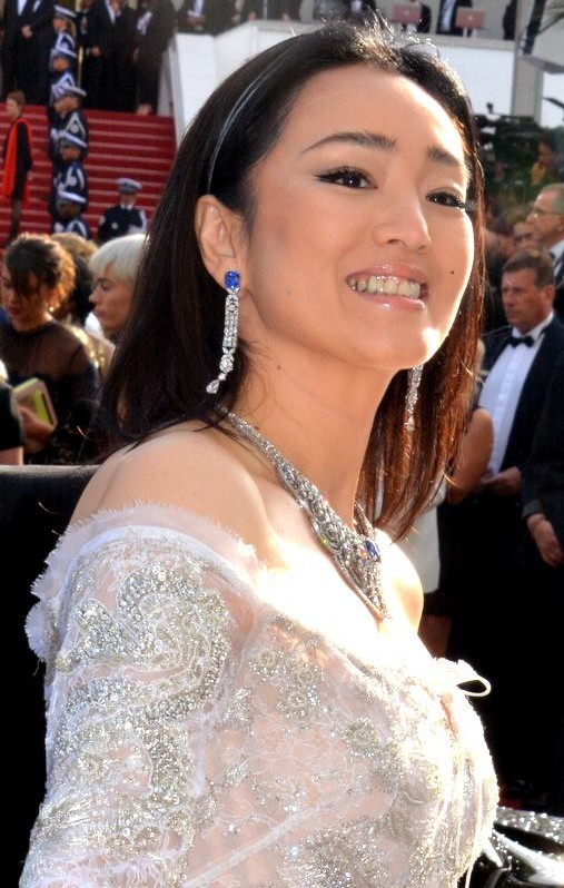 Gong Li au festival de Cannes